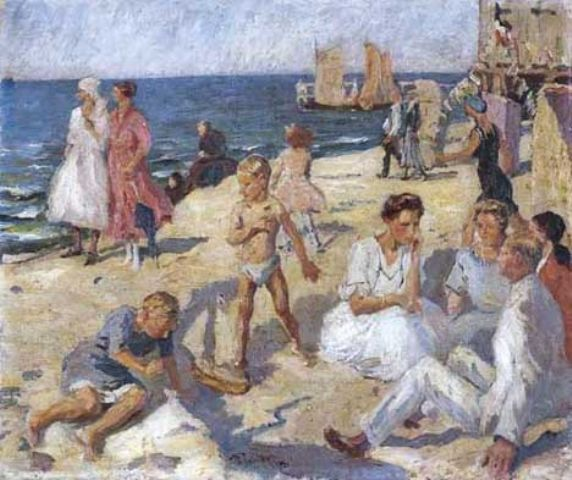 Badestrand an der Ostsee; Öl auf Leinwand; 55.2 x 65.4 cm